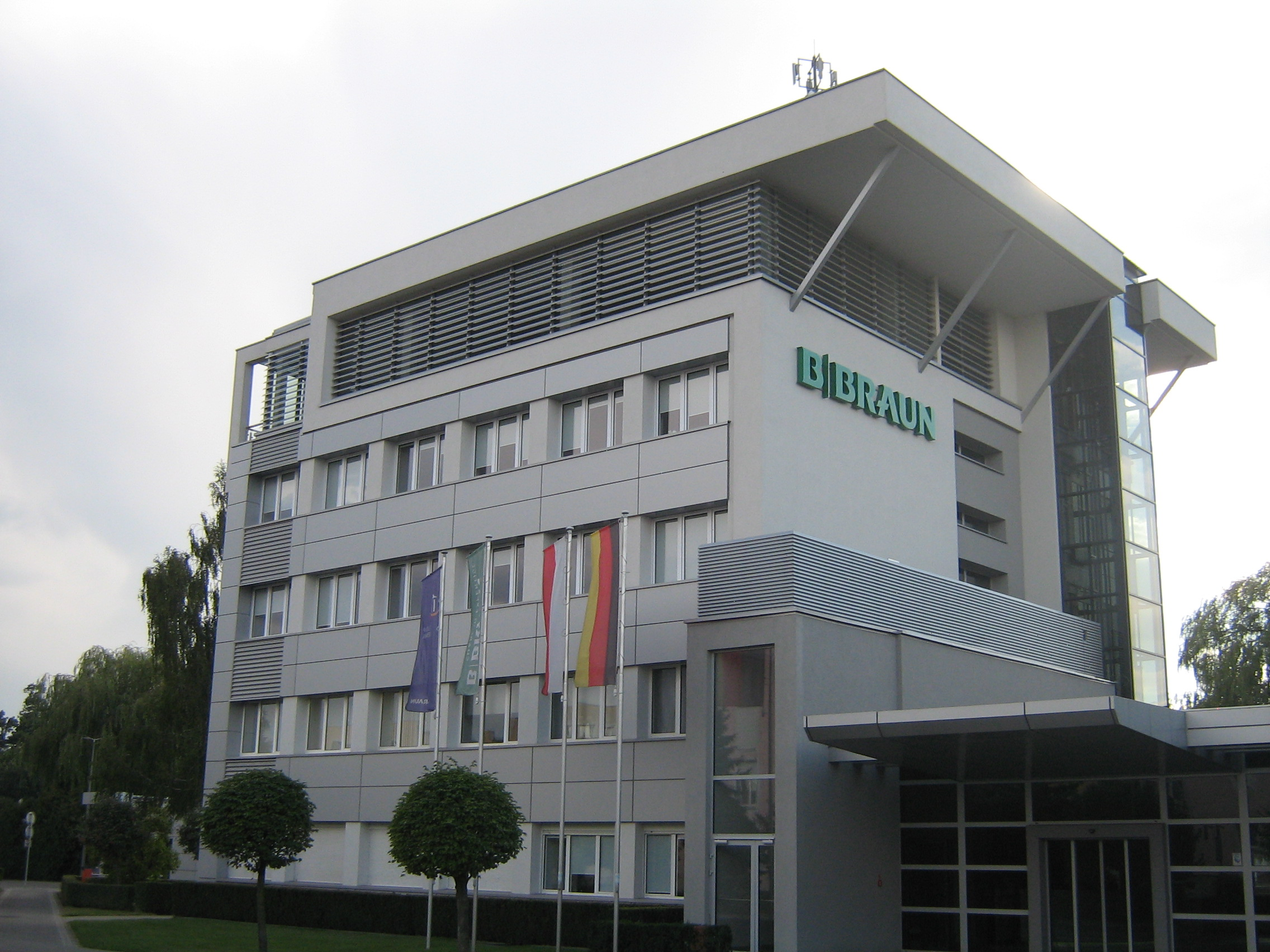 Biurowiec firmy B Braun w Nowym Tomyślu